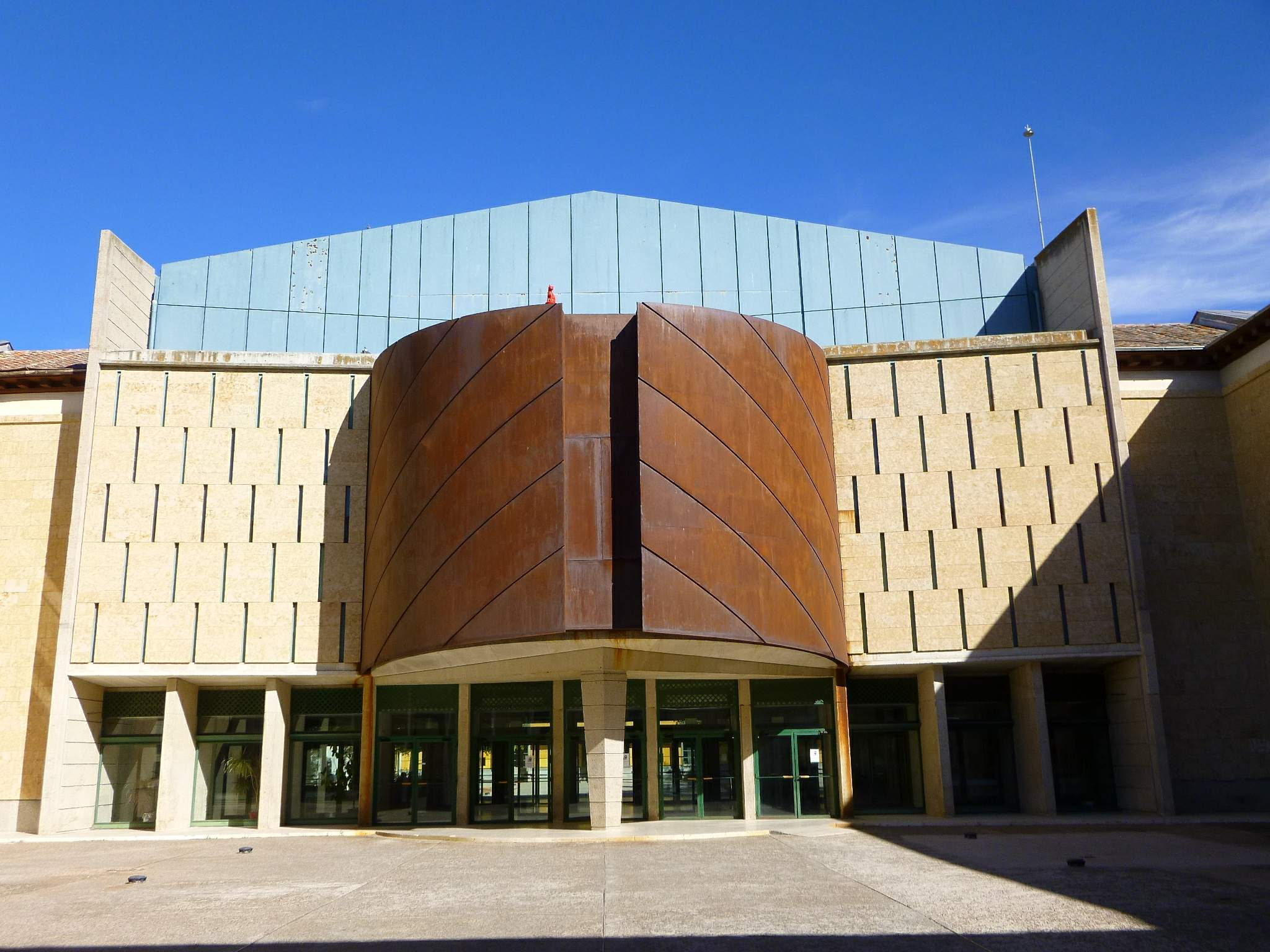 Cocheras de la Reina Madre Isabel de Farnesio (Centro Cultural Isabel de Farnesio), en Aranjuez